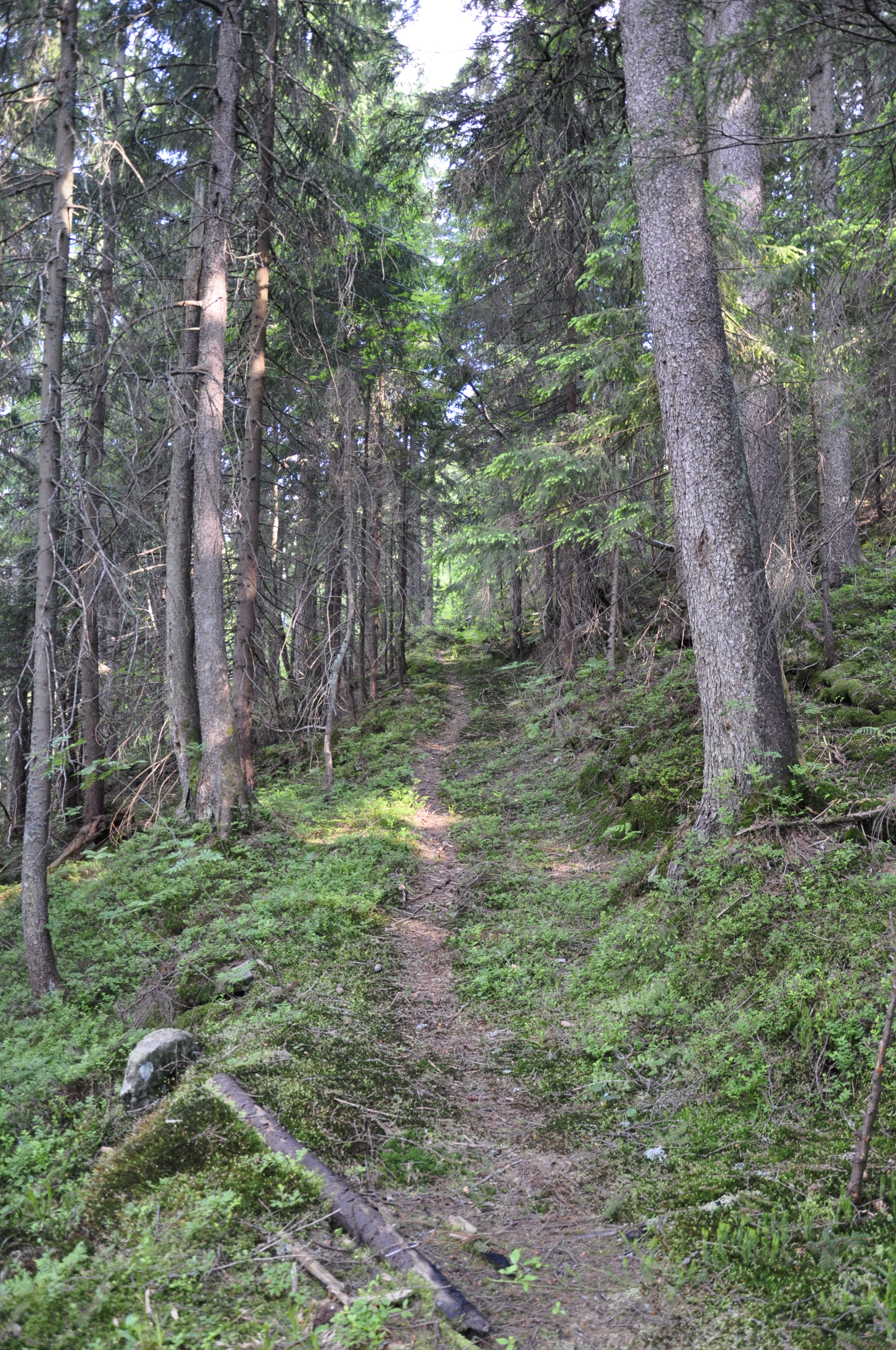 Мисливський райтшток пн. схилом Аршиці